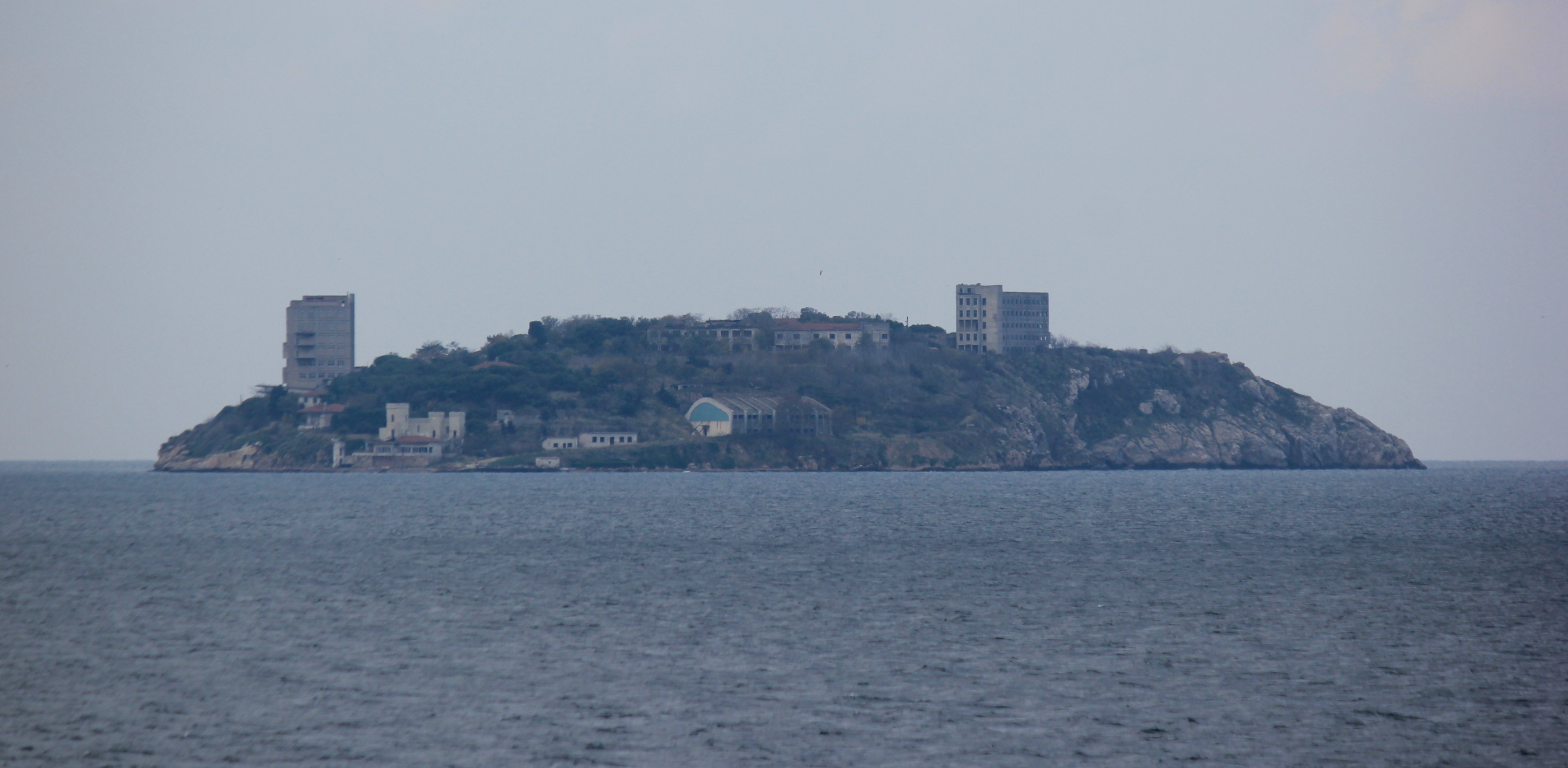 Ostansicht der Insel Yassıada im Marmarameer vor Istanbul.